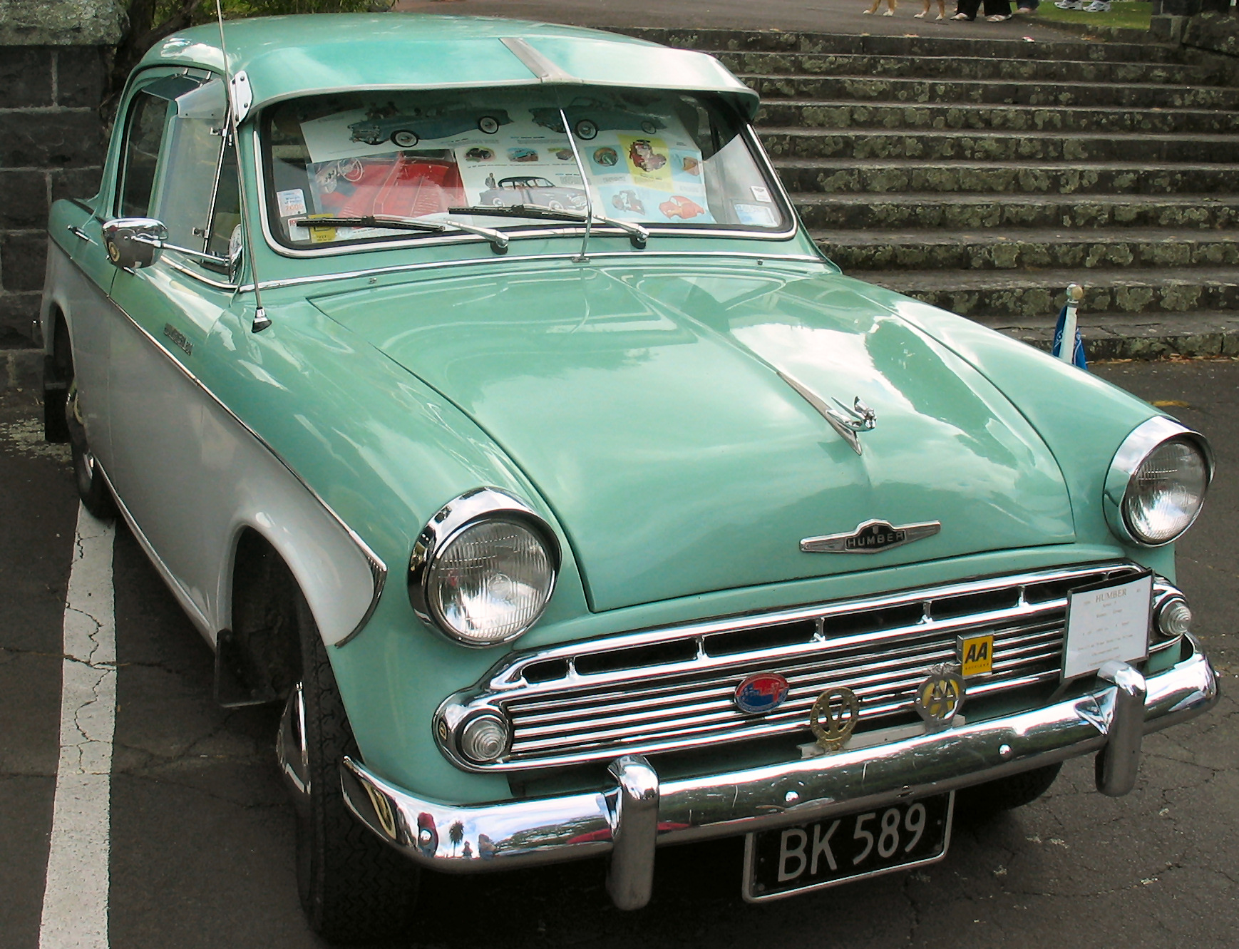 1959 Humber 80, in Auckland, New Zealand.